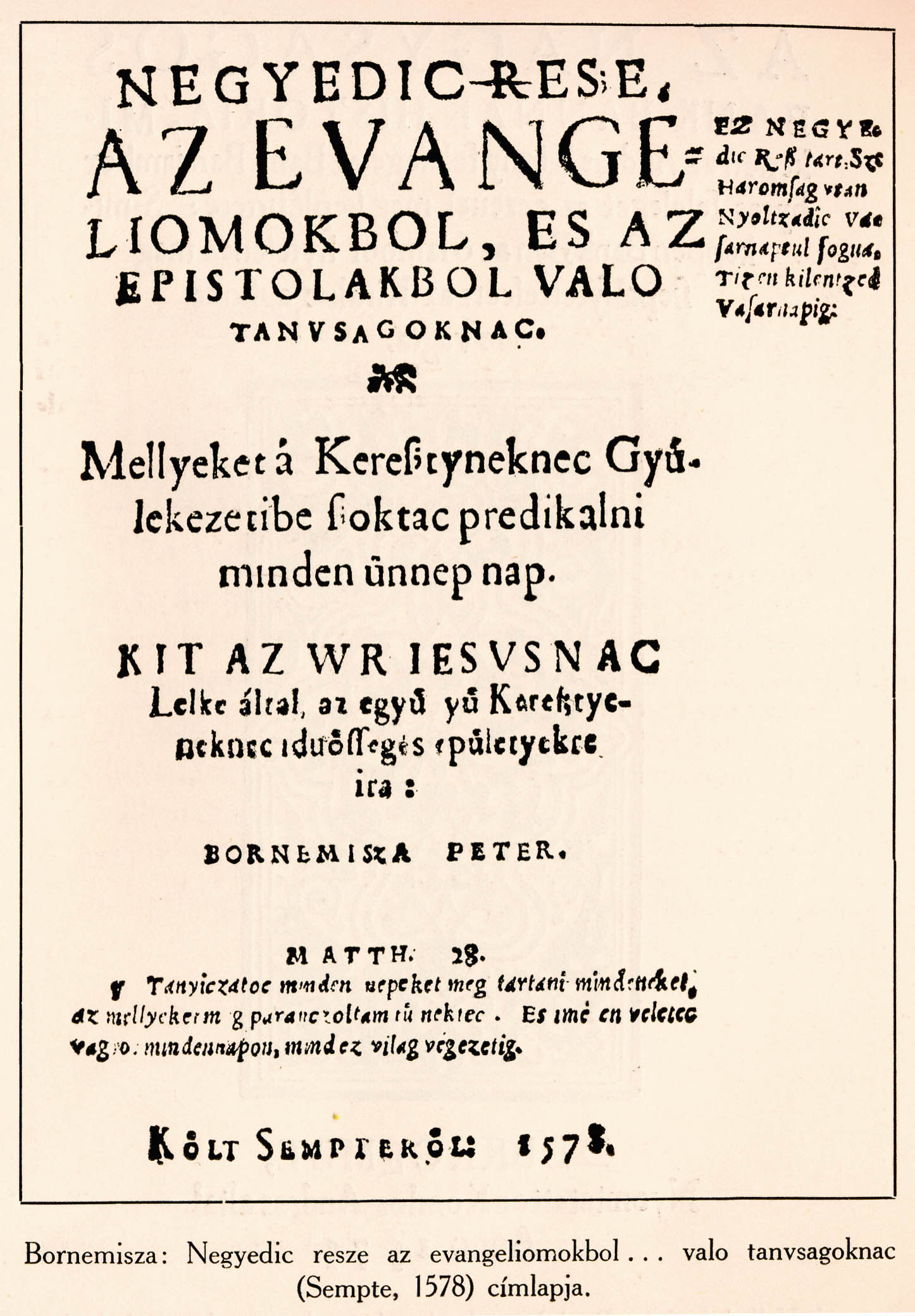 Bornemisza Péter: Postilla negyedik kötet.